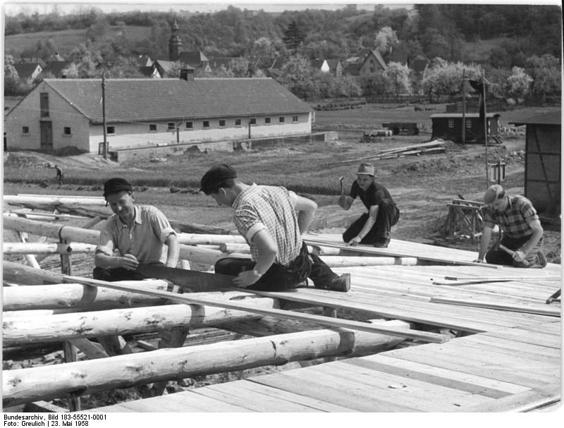 LPG Niedergrossen, Bau eines Stalls Zentralbild Greulich-23.5.1958 Voigt-L-Die LPG "Paul Scholz" in Niedergrossen erhält einen Rinderoffenstall-Am 24.4.1958 begann der VEB (K) Bau, Rudolstadt, mit dem Bau eines Rinderoffenstalles für die LPG "Paul Scholz" in Niedergrossen-Krs. Rudolstadt. Bis zum V. Parteitag der SED soll der Rinderoffenstall "Typ Gera", der für 60 Stück Großvieh bestimmt ist, fertiggestellt sein. Im Nationalen Aufbauwerk wurden vom Rat des Kreises, dem Konsum und der Grenzpolizei Rudolstadt für ca. 3.000 DM Arbeitsstunden geleistet. UBz: Die Zimmerleute vlnr: Rudolf Hoyer, Walter Büttner, Horst Bloss und Karl-Heinz Ullrich auf der Baustelle